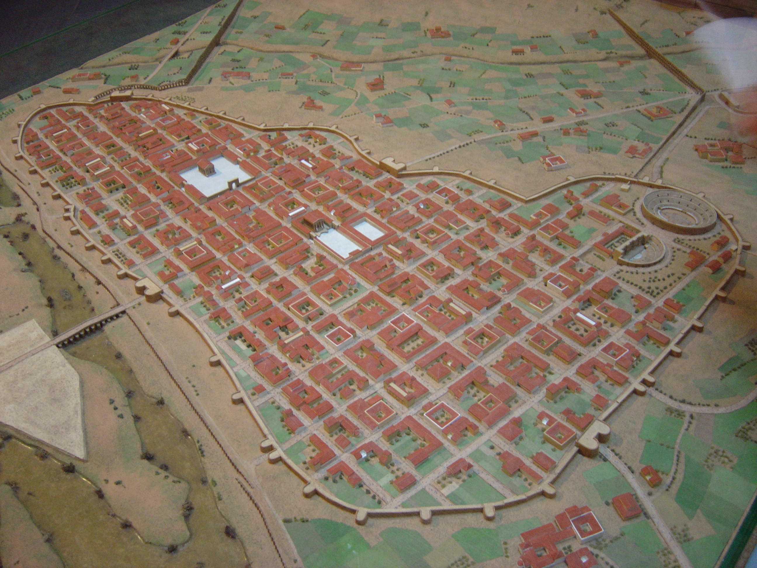 Maqueta de Emerita Augusta, Museo Nacional de Arte Romano (Mérida, Badajoz)